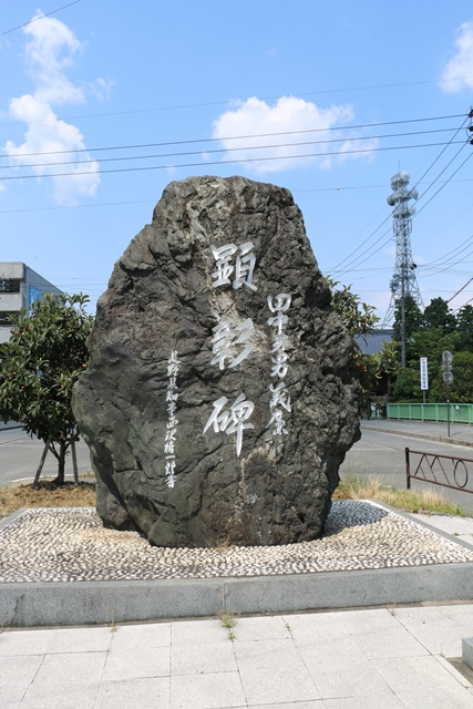 飯田市内にある田中芳男の顕彰碑Template:屋外美術